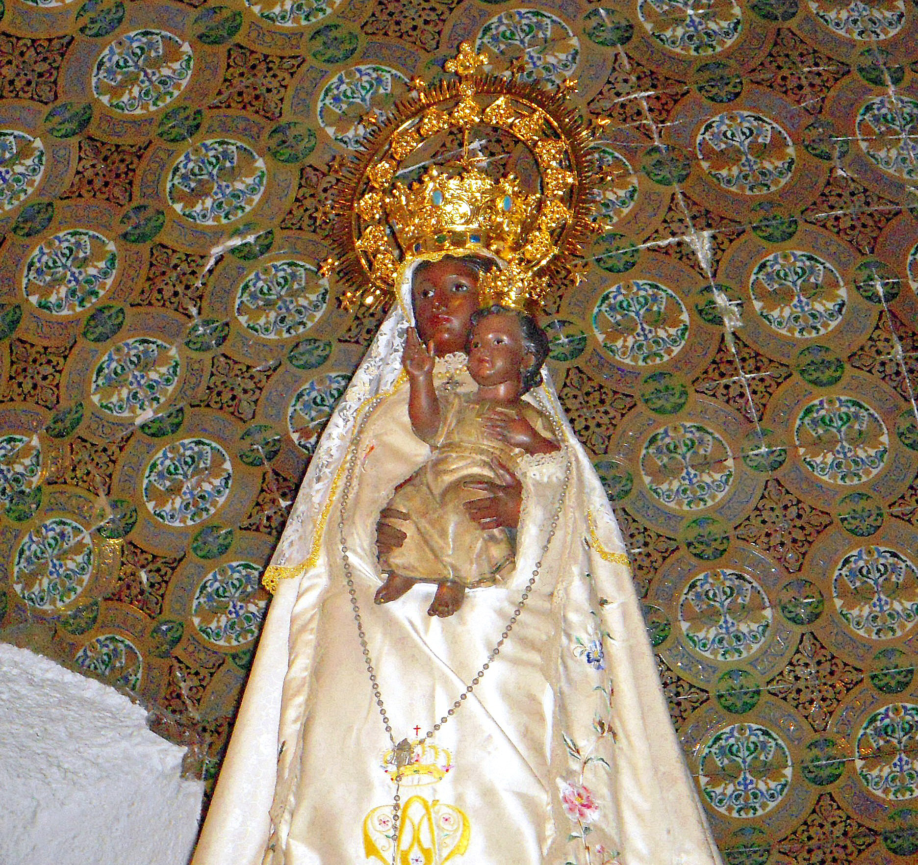 Patrona de Castilla y León